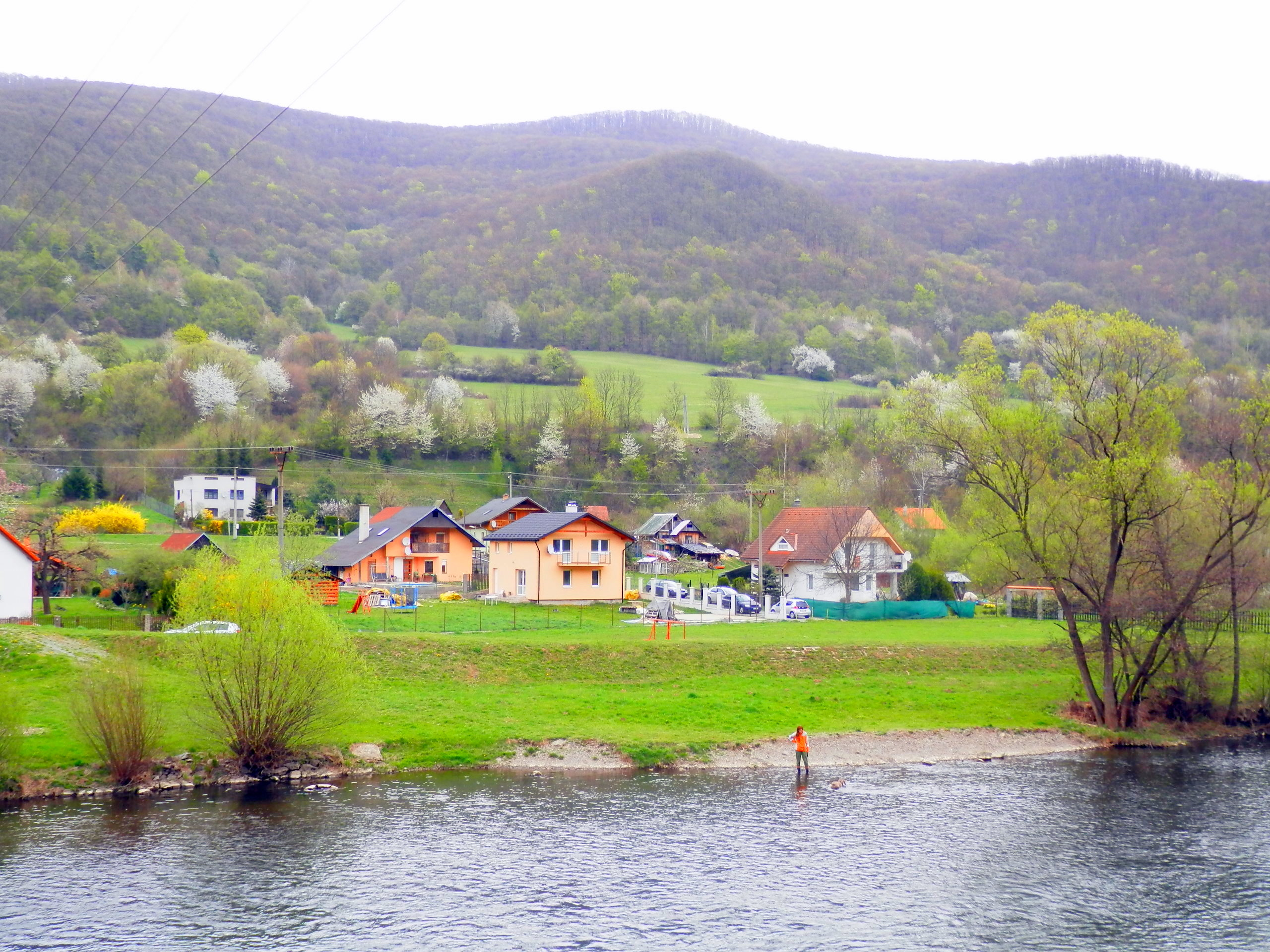 Rieka Hornád. Obec Malá Lodina, okres Košice okolie.